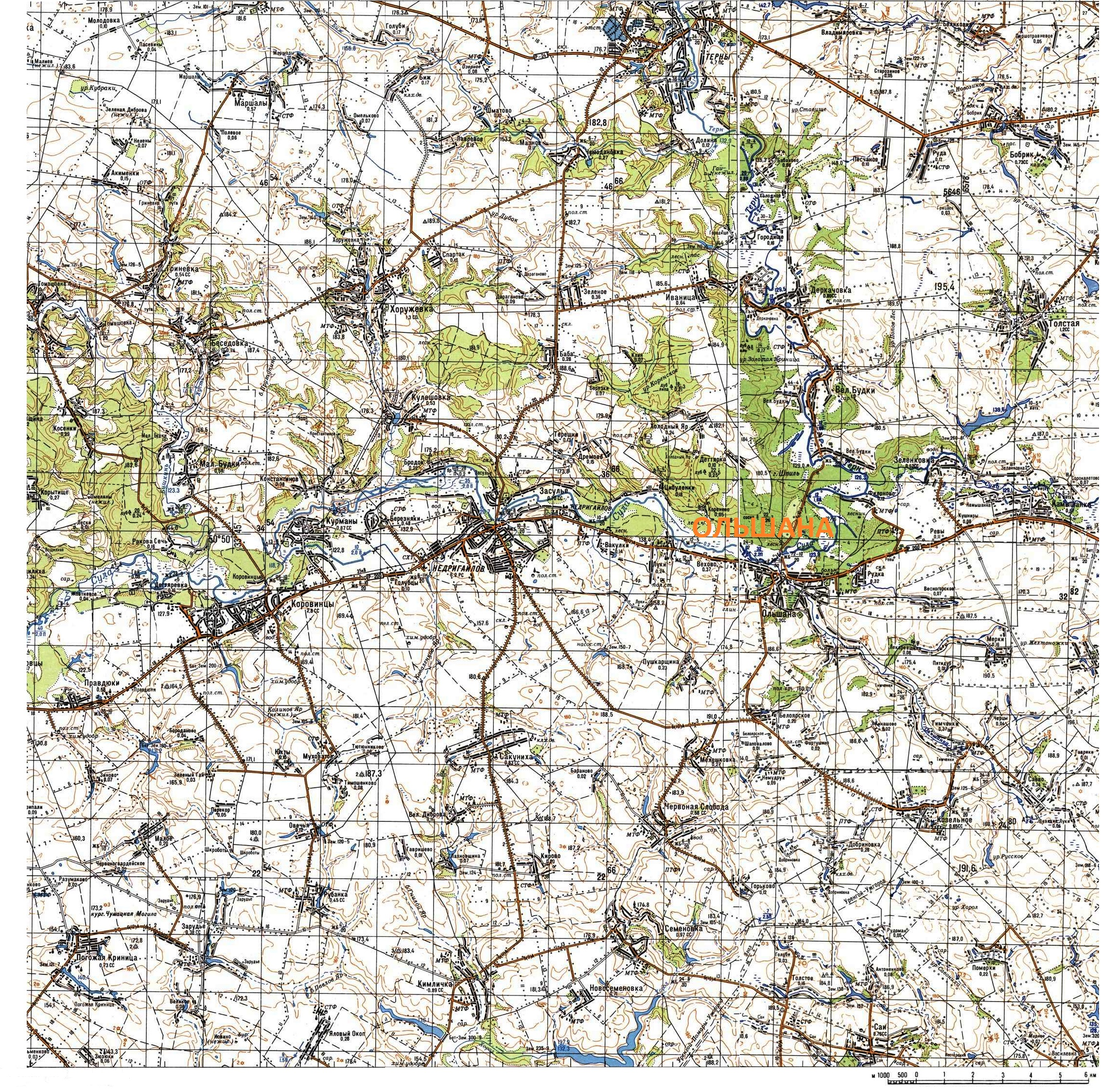 Детальна карта